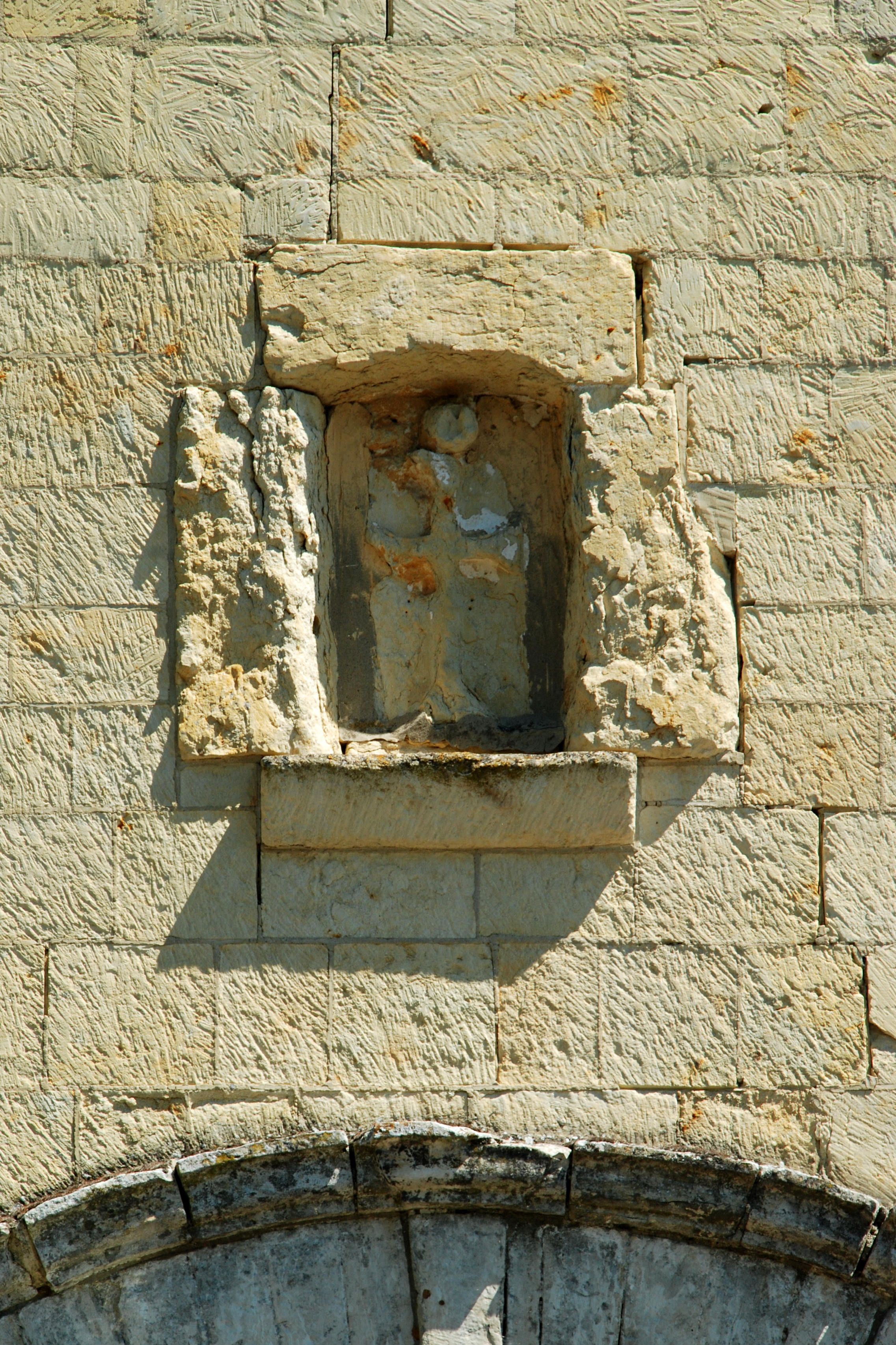 Belgique - Brabant wallon - Hélécine - Linsmeau - Chapelle Notre-Dame de la Colombe